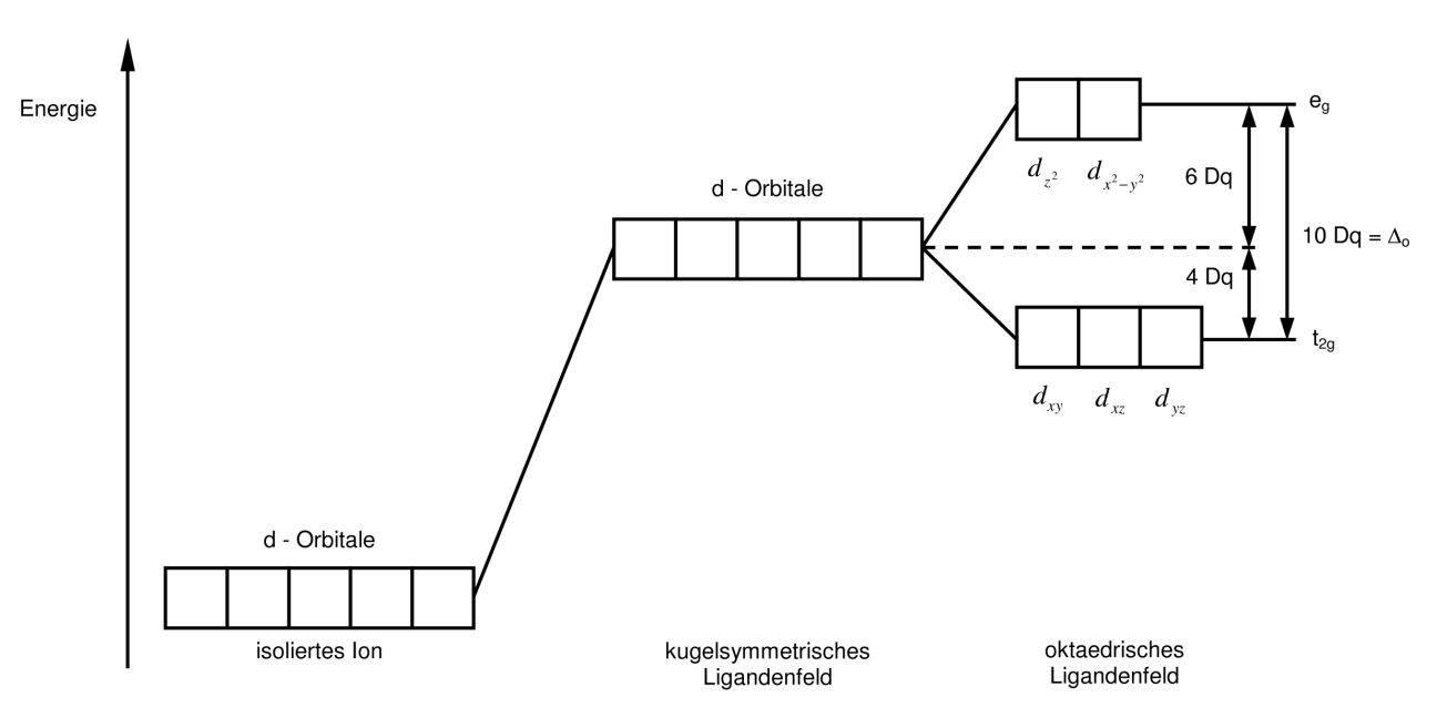 Energieniveaudiagramm-Ligandenfeldaufspaltung